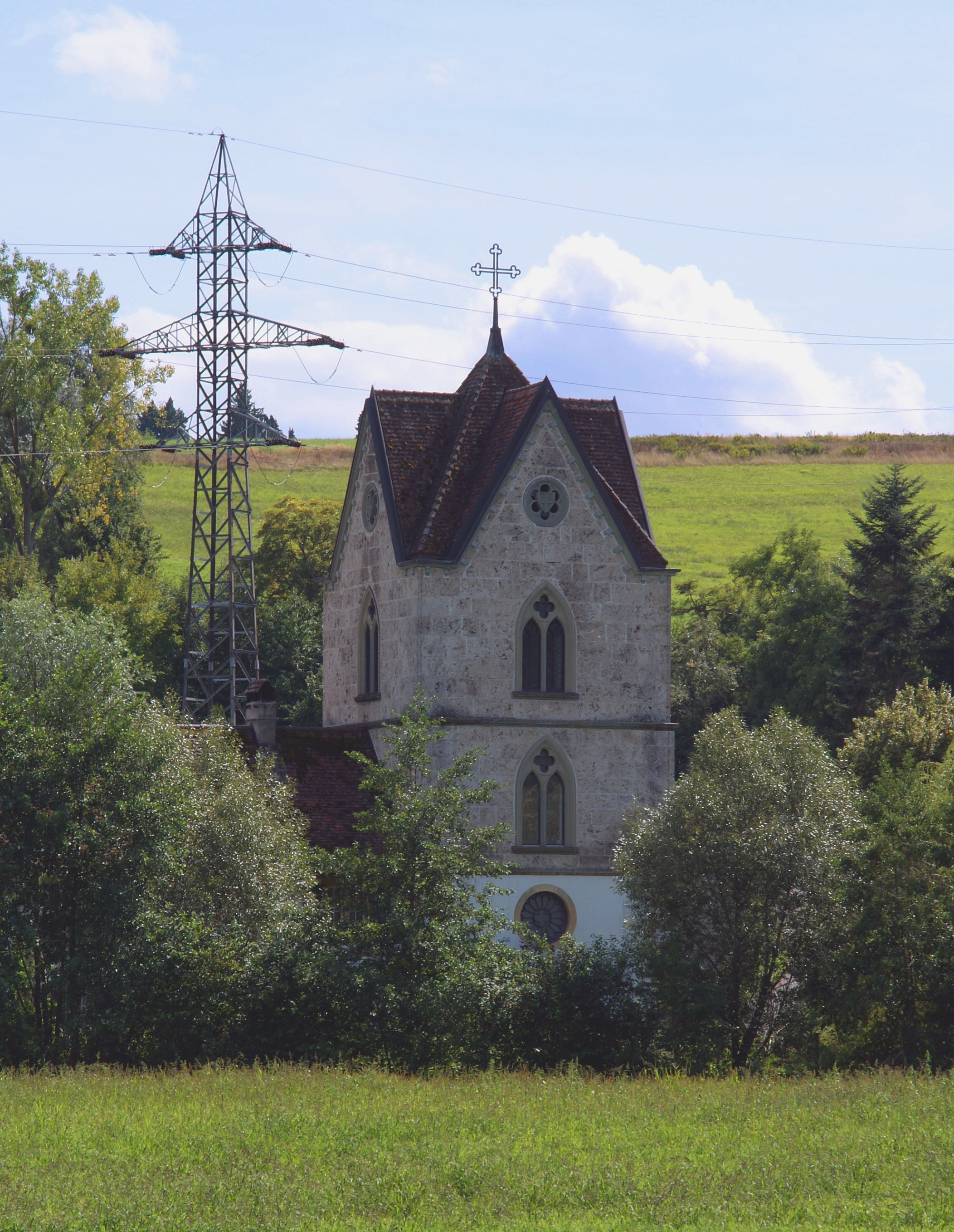 Ermitage von Schloss Löwenberg bei Murten nach dem Vorbild der Chartreuse von Hilterfingen